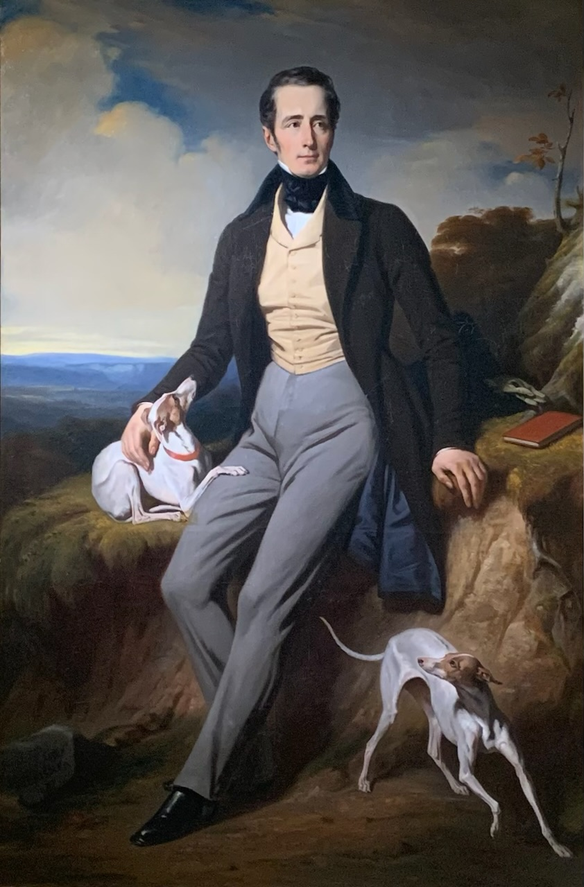 Alphonse de Lamartine (1790-1869) et ses petits lévriers italiens.